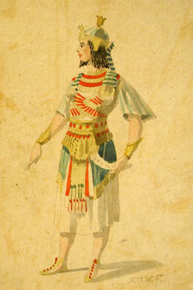 Figurí del rei d'Egipte, pare d'Aïda, per Soler i Rovirosa (conservat al MAE) Alier, Matas: EL GRAN TEATRO DEL LICEO (Historia artística), Ed. Francesc X. Matas, BCN, 1991, pp. 461; Verdi: AIDA, programa Gran Teatre del Liceu, temporada 2002- 2003. Premsa: La Imprenta, 18.04.1876; Diario de Barcelona, 18.04.1876; La Imprenta, 26.02.1877; Almanaque del Diario de Barcelona para 1877. Documents MAE: Escenografia: EscE15; Figurins reposició 1883 (Ll. Labarta):EscF8. Datat el febrer de 1876. L' òpera Aïda es va estrenar a El Caire el 1871 i a Barcelona al Teatre Principal el 16/4/1876. Aquest figurí pertany a un grup de vint-i-nou que es crearen per a aquesta estrena. Provablement són els mateixos que es van fer servir la temporada següent al Liceu. Aquests vestits es van anar utilitzant amb poques variacions, fins el 1883, any en que es va fer una reposició de l' òpera de Verdi. En aquesta ocasió en Lluís Labarta es va fer càrrec del vestuari.